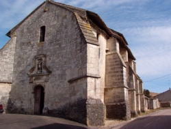 Église de Sepvigny (Meuse)(Francis Montignon) GFDL Francis Montignon Catégorie:Image de commune de la Meuse